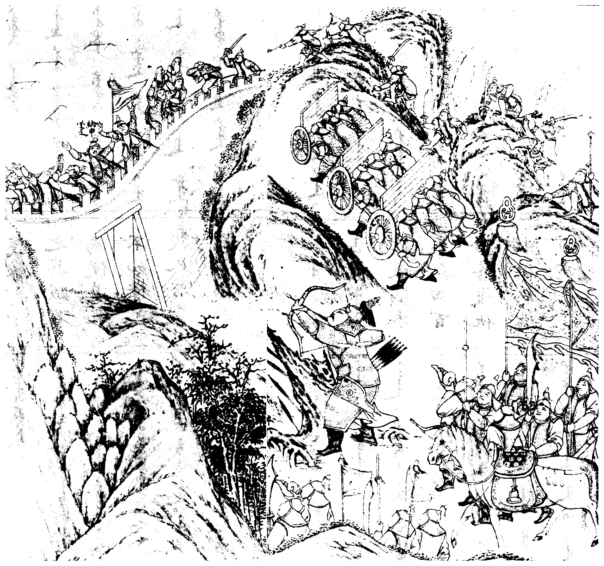 中文（中国大陆）: 弩尔哈齐大戰瑪爾墩